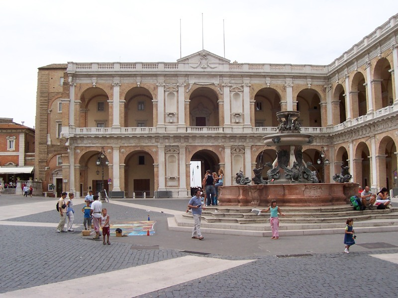 Loreto - Piazza del Santuario